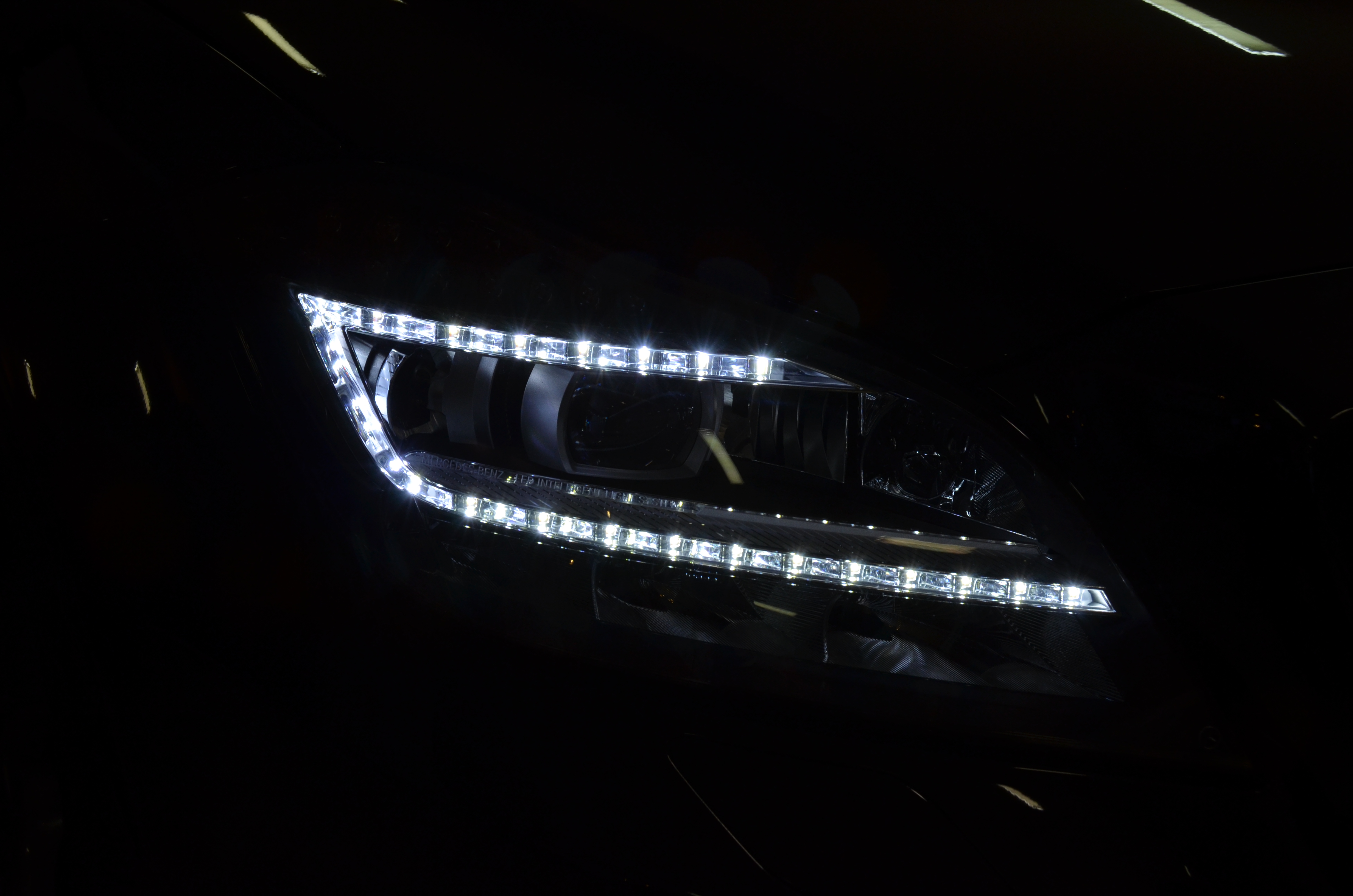 LED-Scheinwerfer eines Mercedes-Benz C218 CLS 63 AMG